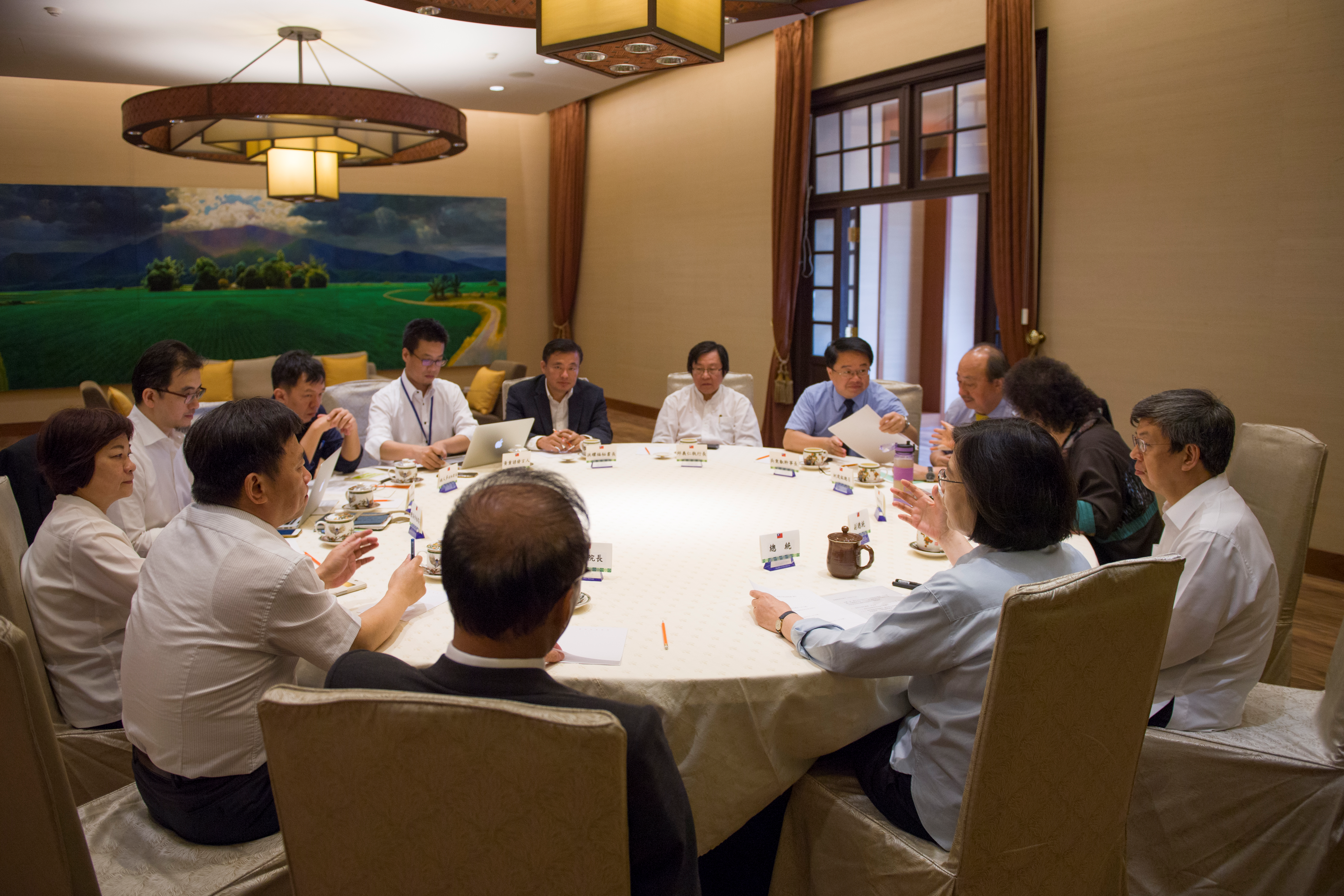 中華民國總統蔡英文在總統府召開首次「執政決策協調會議」，出席者：蔡英文、林全、林錫耀、陳美伶、劉建忻、姚人多、黃重諺、洪耀福、邱義仁、吳秉叡、柯建銘、陳菊、陳建仁。